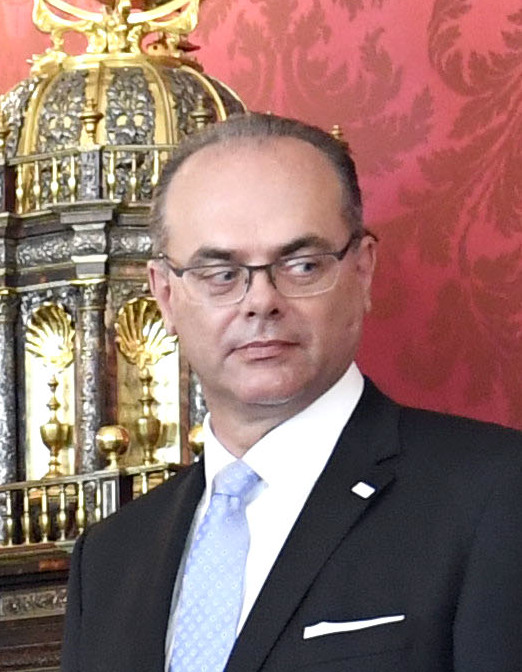 Am 3. Juni 2019 wurde Mag. Alexander Schallenberg als Bundesminister für Europa, Integration und Äußeres angelobt. Foto: Mahmoud